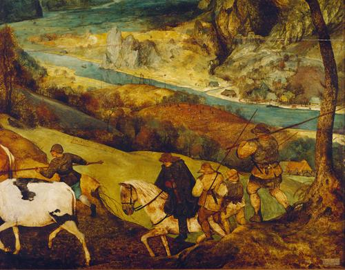 BRU - mandria